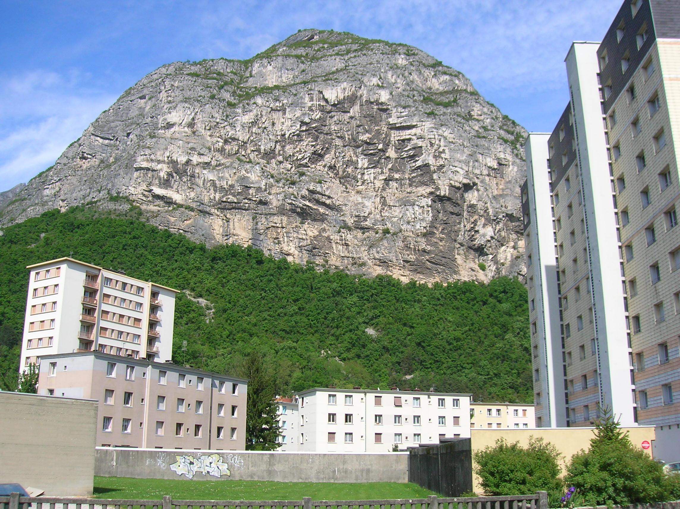 mont sur Saint-Martin-le-Vinoux.